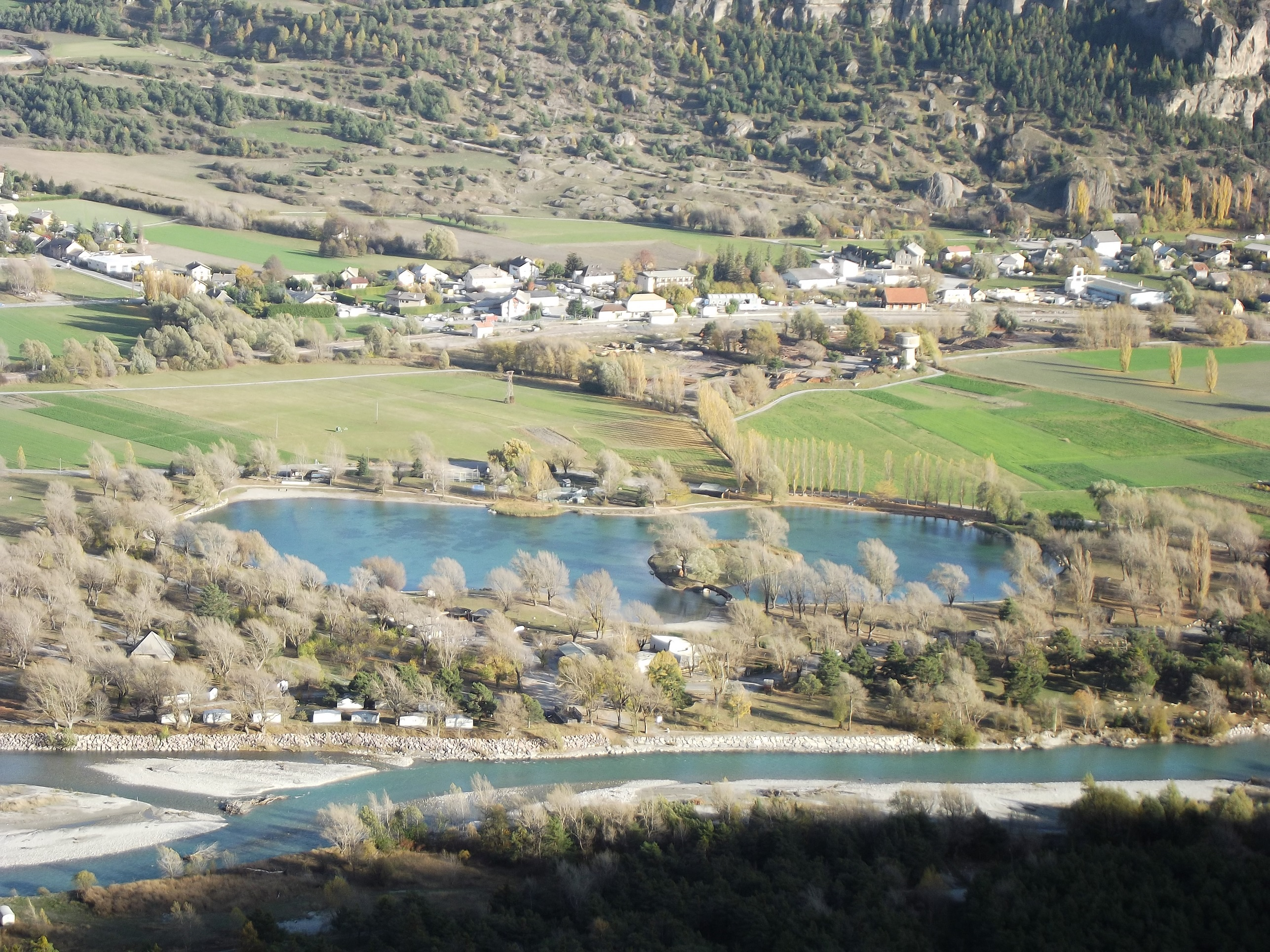 Plan d'eau d'Eygliers vu de la montagne en face (l'Aiguille)